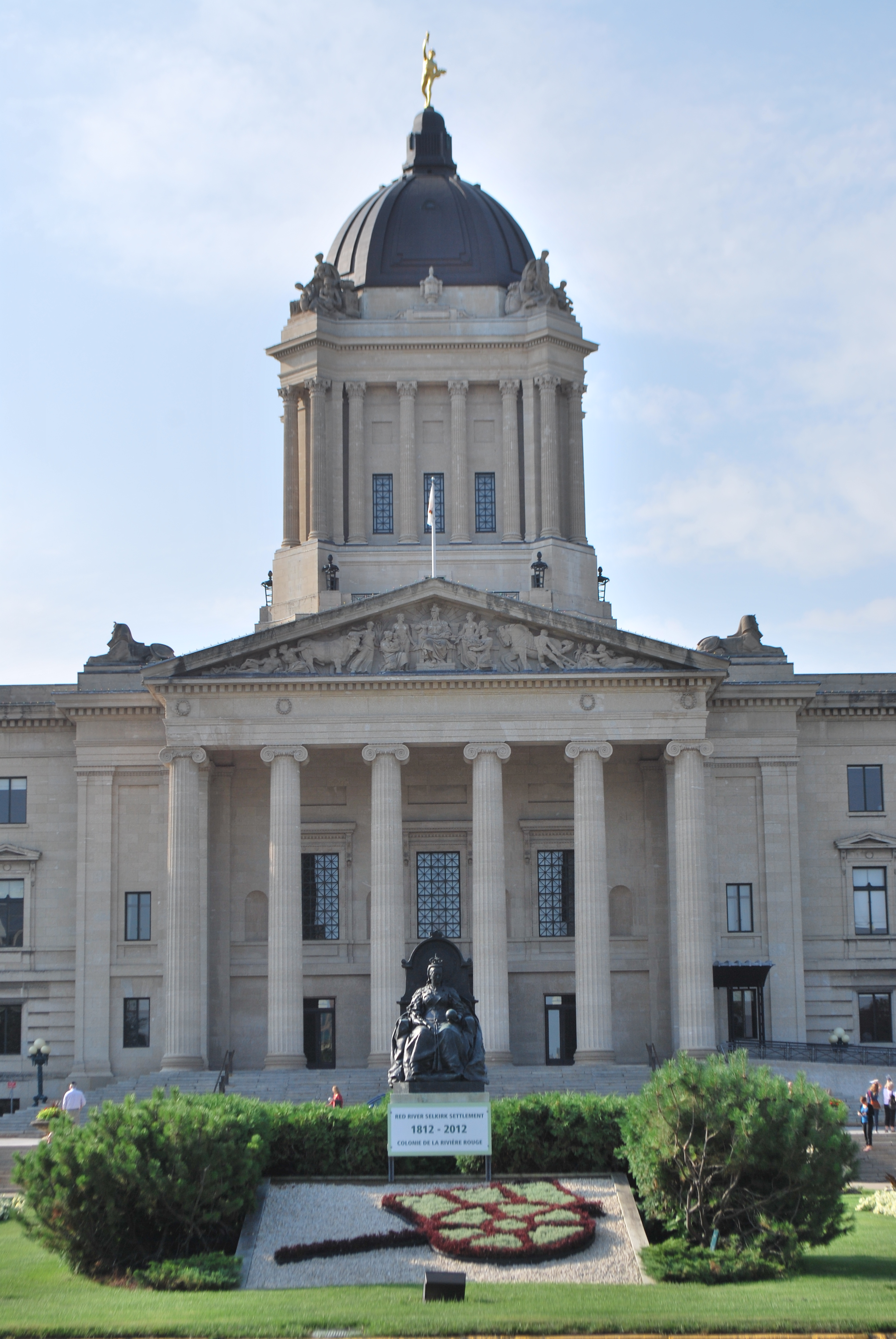 Assemblée législative du Manitoba à Winnipeg, Canada.